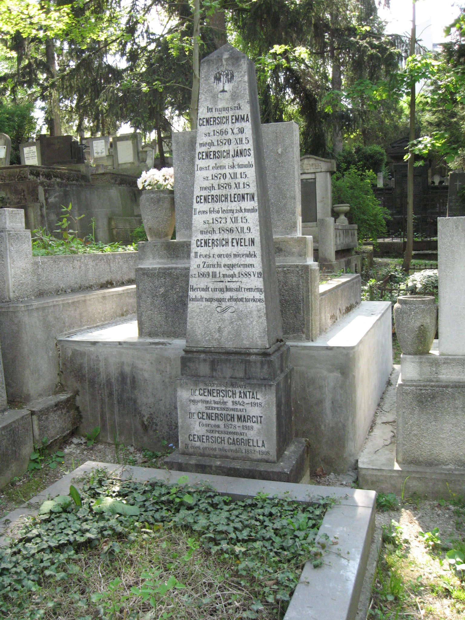 Genersich Antal sírja a kolozsvári Házsongárdi temetőben.